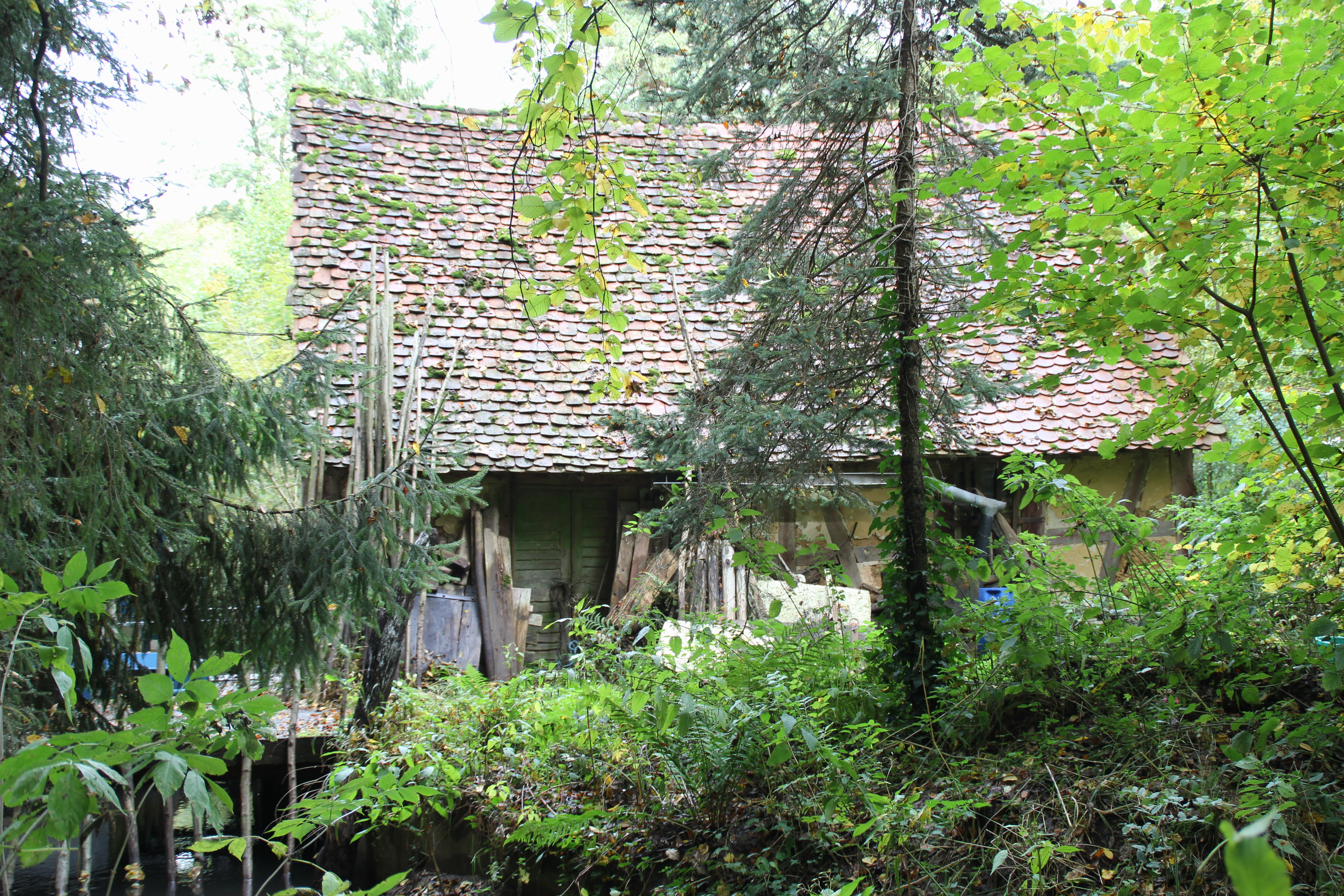 Das Gebäude der ehem. Ölmühle an der Hellenthalsmühle im Jahr 2019